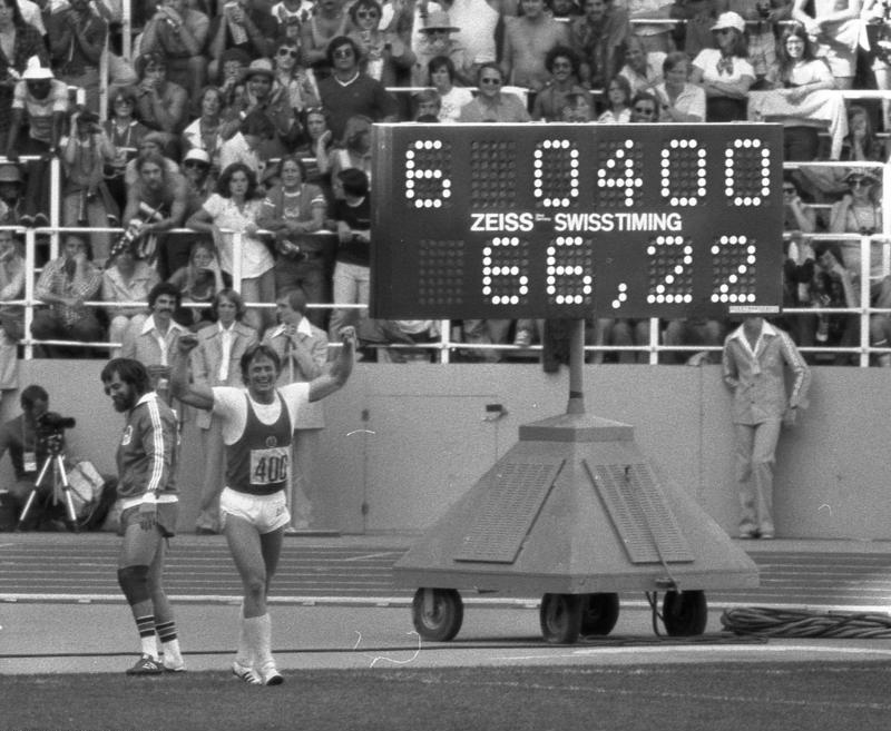 Montreal, Olympiade, Wolfgang Schmidt ADN-ZB/Gahlbeck-Tele/25.7.76 [Herausgabedatum]/Montreal: XXI. Olympische Sommerspiele/Leichtathletik DDR-Diskuswerfer Wolfgang Schmidt jubelt. Mit seinen 66,22 Metern hat er sich hinter dem Weltrekordler Mac Wilkins (USA/67.50m) auf Rang 2 schieben können. An dieser Reihenfolge änderte sich auch bis zum Schluß des olympischen Finales in dieser Disziplin nichts mehr. Wolfgang Schmidt gewann Silber vor dem US-Amerikaner John Powell (65,70m). Abgebildete Personen: Schmidt, Wolfgang: Leichtathlet, Diskuswerfer, Olympiateilnehmer 1976, DDR